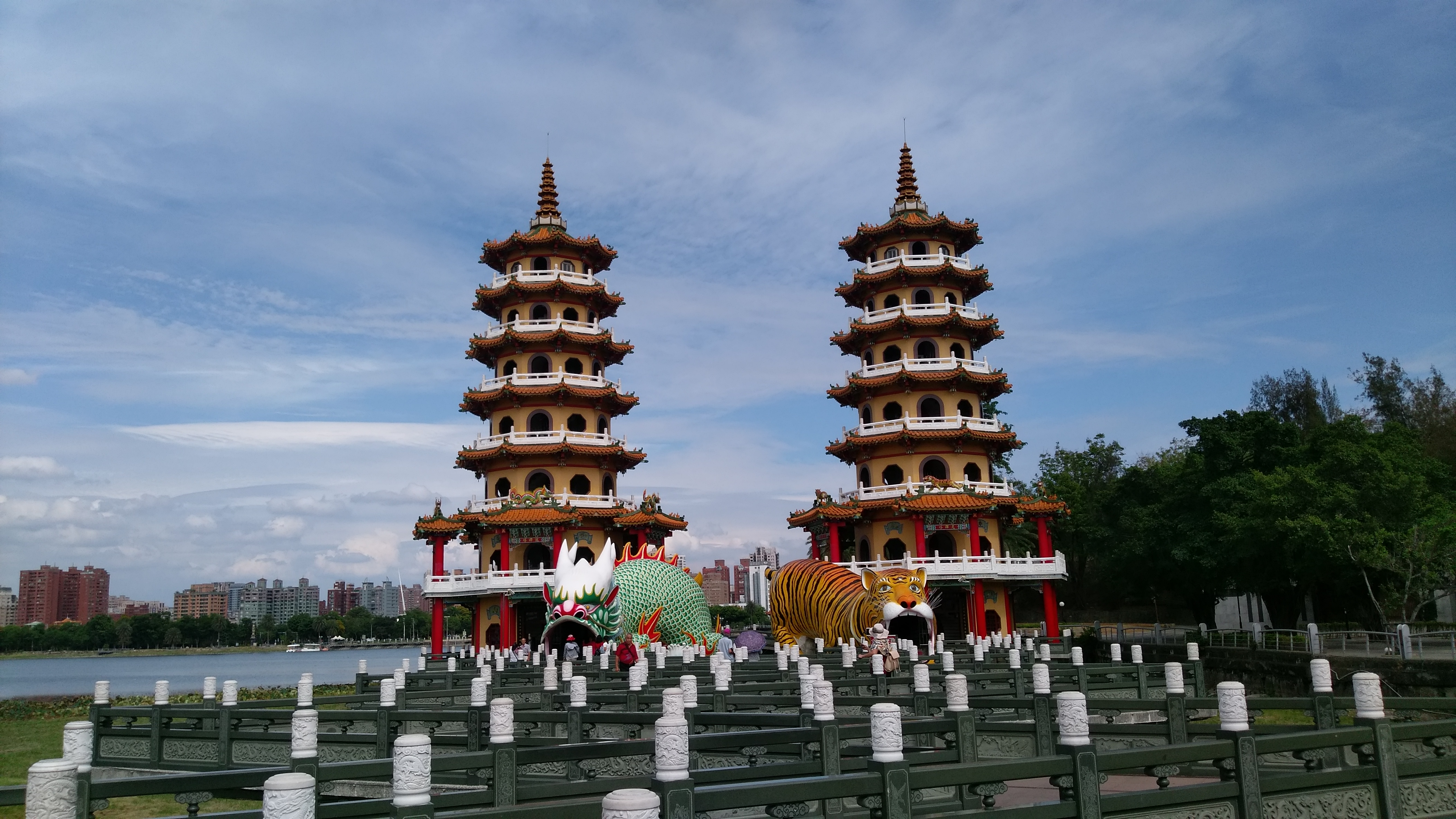 中文（台灣）: 城邑左營慈濟宮附設龍虎塔